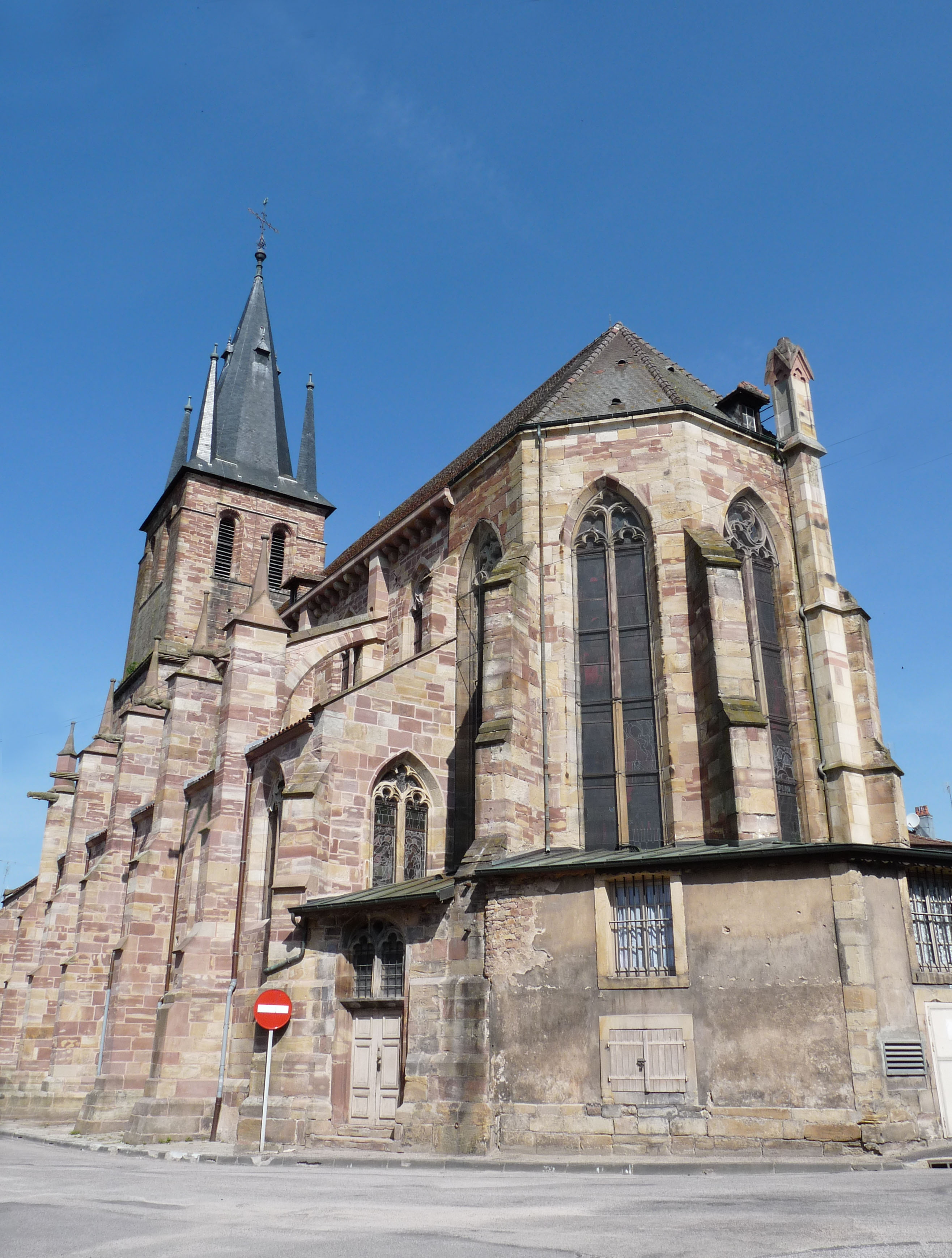 Eglise Sainte-Libaire de Rambervillers (Vosges). L'édifice a été classé au titre des monuments historiques en 1986.